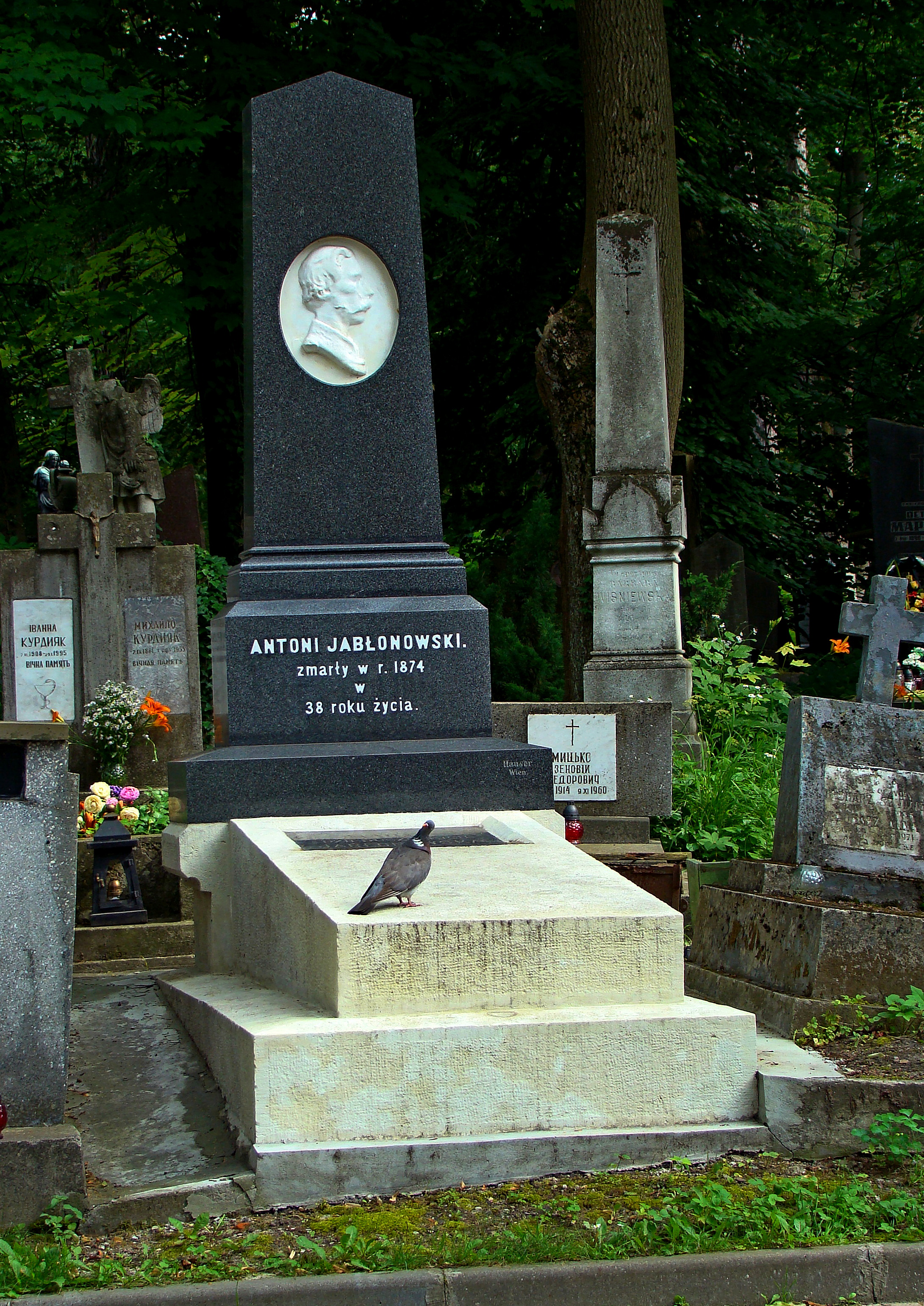 Надгробок А.Яблоновського.Личаківський цвинтар,поле № 57.